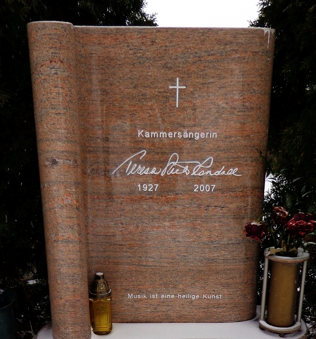 Feuerhalle Simmering - Urnenhain, ehrenhalber gewidmetes Urnengrab der Opernsängerin (Sopran) Teresa Stich-Randall (Abteilung 2, Ring 3, Gruppe 1, Nummer 7).